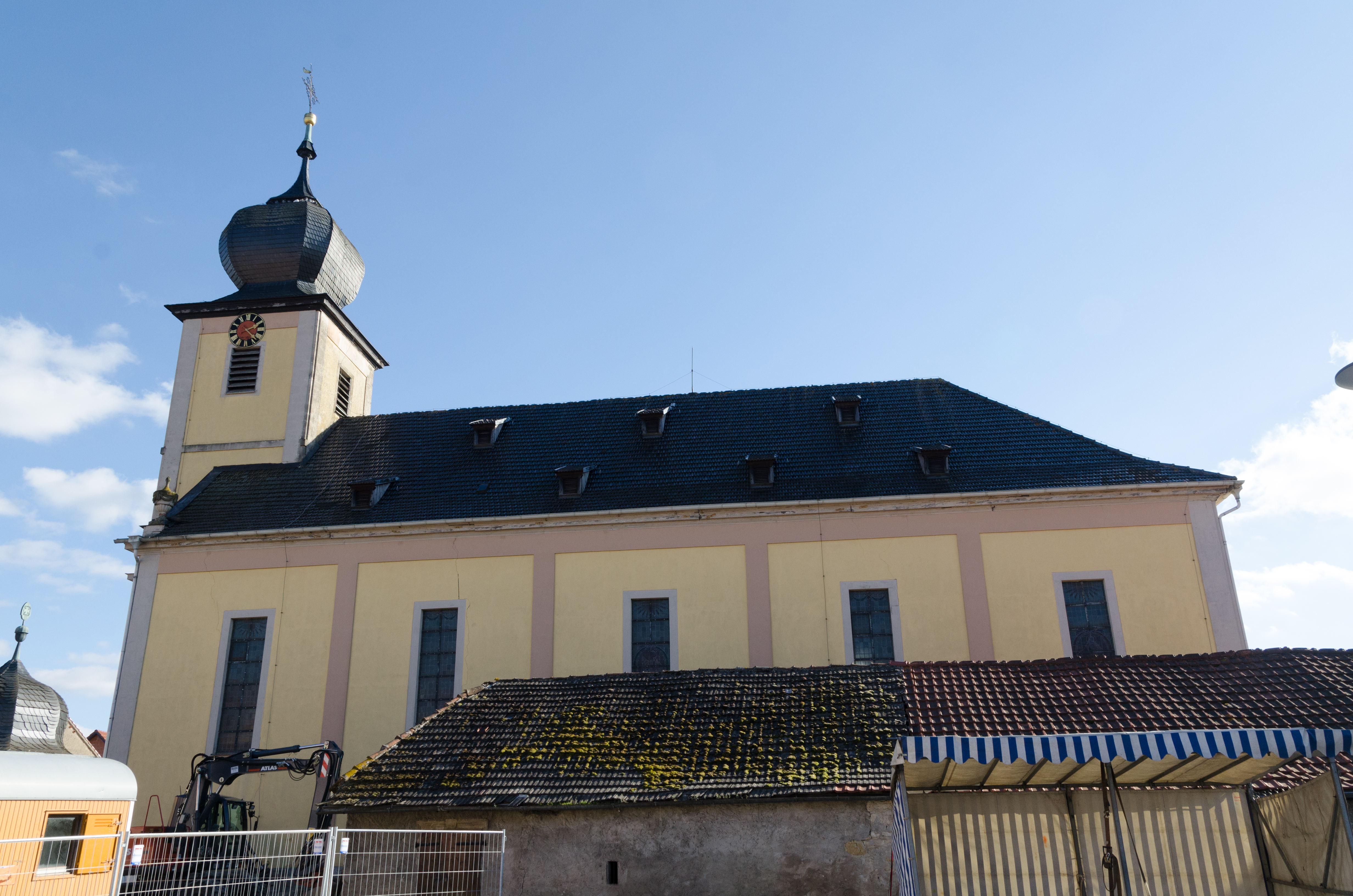 Donnersdorf, Katholische Pfarrkirche St. Johannes der Täufer